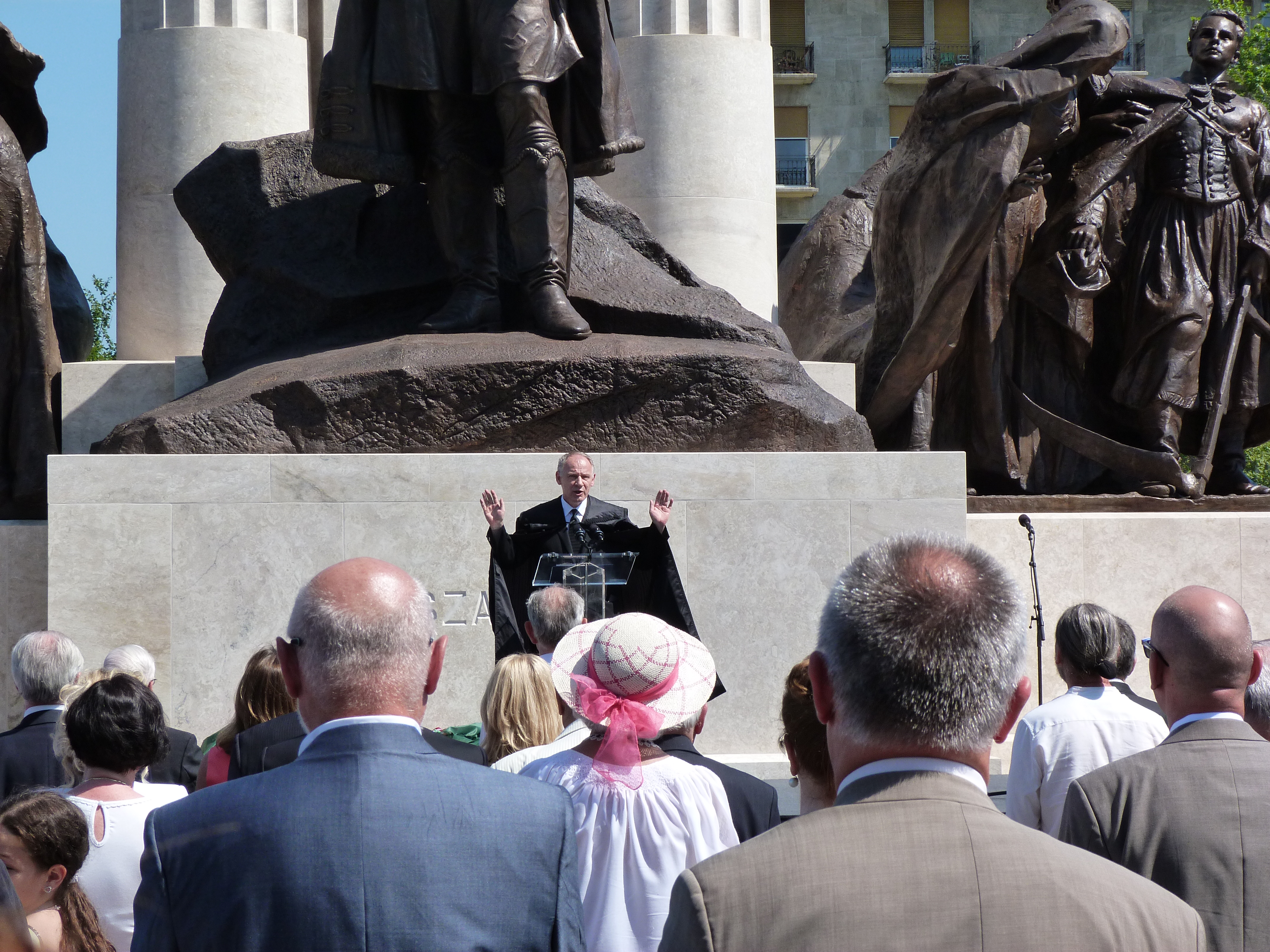 A felvételek 2014. június 9 –én, Pünkösd hétfőn készültek Budapesten, a Kossuth téren. Gróf Tisza István szobrának újraavatása. Beszédet mondott Orbán Viktor. Bogárdi Szabó István püspök, Dunamelléki Református Egyházkerület. A szoborcsoportot újraalkotta Elek István szobrász. A szoborcsoportot Zala György és Orbán Antal tervei alapján 1934. április 22-én (Tisza István születésnapján) állítottak fel. 17 méter magas volt, talapzata süttői mészkőből készült. Az oroszlánt 36 köbméter kőből faragták ki, és 12 darabból állították össze. A második világháború folyamán megsérült, majd 1945 tavaszán ismeretlenek lerombolták. A szobor főalakját, a 18 mázsányi töredéket később beolvasztották. Az emlékmű meg nem semmisített darabjai közül a földművelőket ábrázoló szoborcsoport Esztergomba került, A katona búcsúja című mellékcsoportot a Hűvösvölgyi úti laktanya udvarára, majd a keceli Pintér Művek haditechnikai gyűjteményébe vitték, a posztamens tetejét díszítő kőoroszlánt pedig 1948-ban a Hegyalja út végében, a hajdani tabáni temető helyén állították fel, majd a hatvanas években nyersanyagként fiatal művészeknek osztották ki. Így került az oroszlán feje egy fiatal szobrászművészhez, aki érintetlenül megőrizte, és ma is szentendrei háza kertjében tartja. Cimkék: Gróf Tisza István Budapest Kossuth tér Orbán Viktor Zala György Orbán Antal 2014 Steindl Imre Program Elek István szobrász Szvorák Katalin népdalénekes Források: Orbán: Van, akit nem elég egyszer megölni